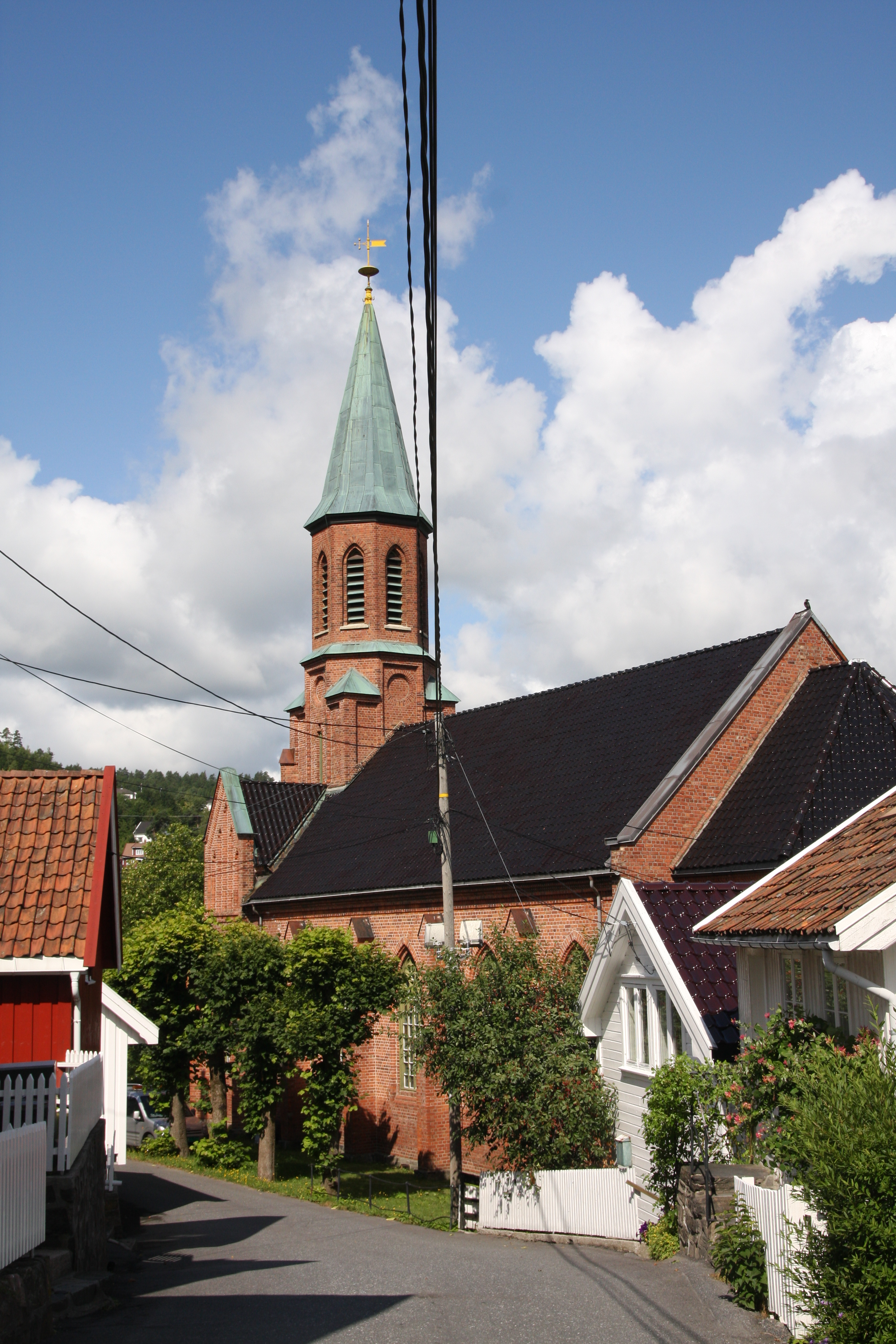 Tvedestrand kirke